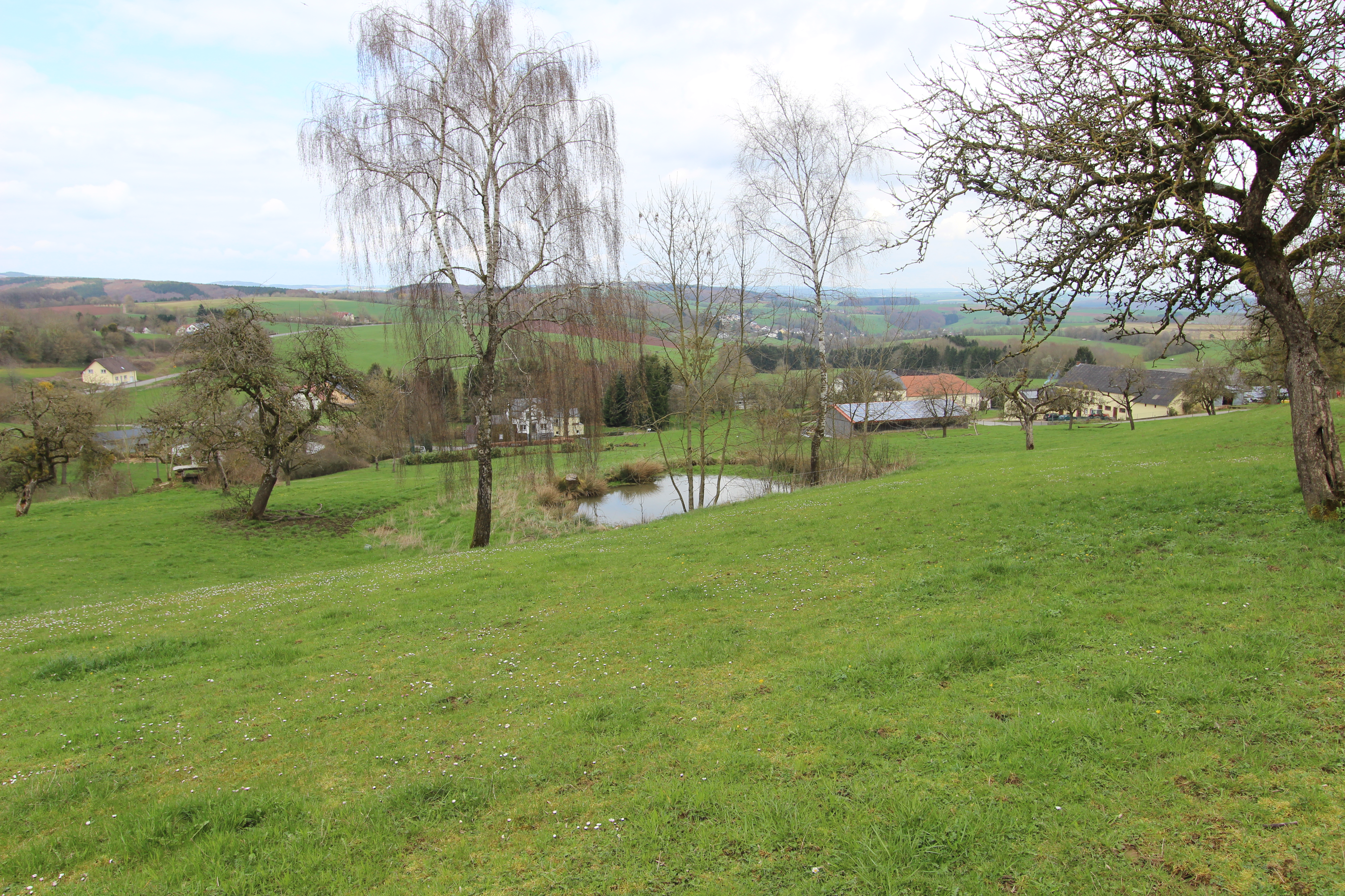 54646 Brimingen aus westlicher Richtung an der Kreuzung Dorfstraße und Am Maarfeld; Foto von 2016